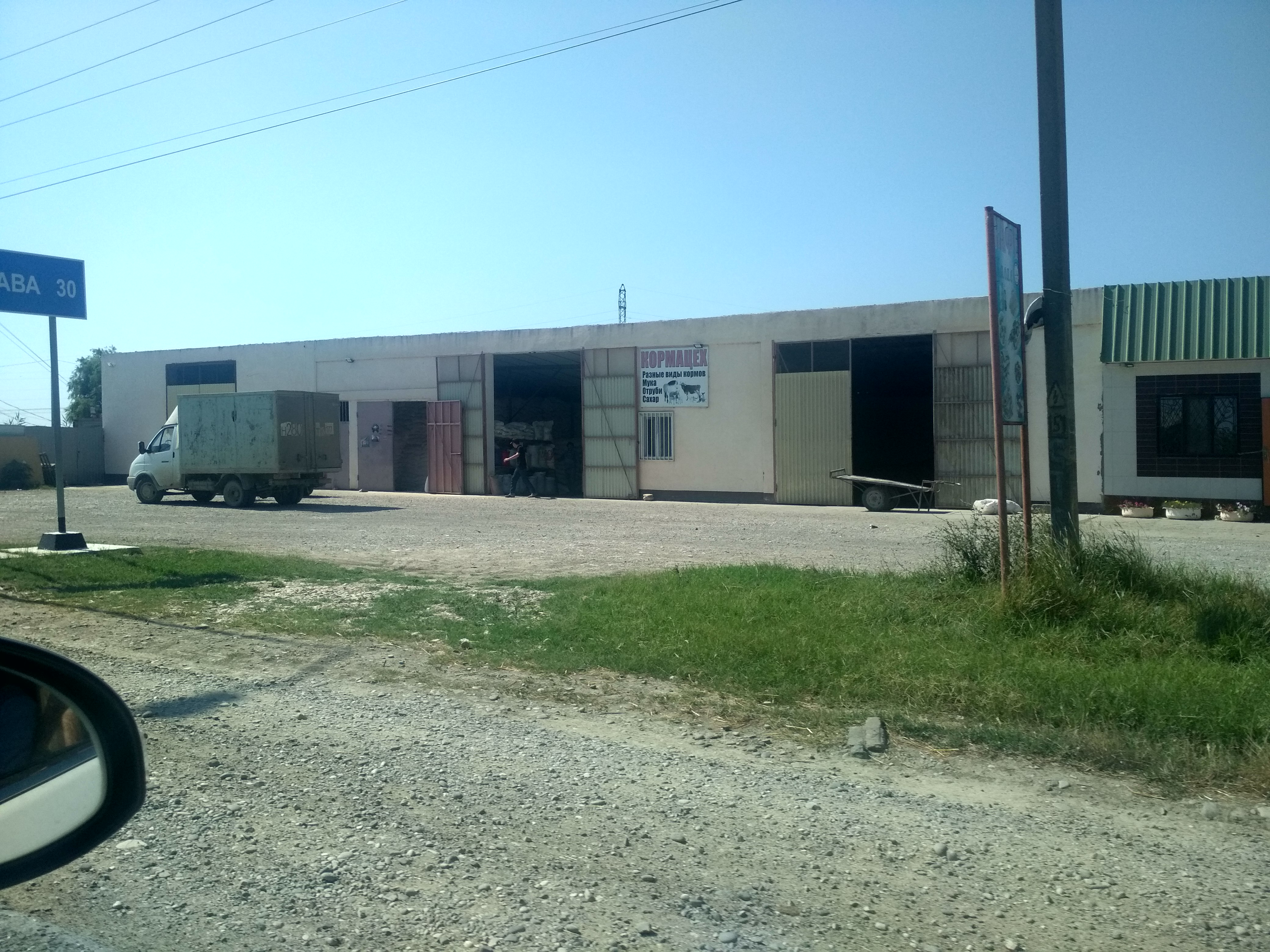 Нохчийн: Бабаюртан йист